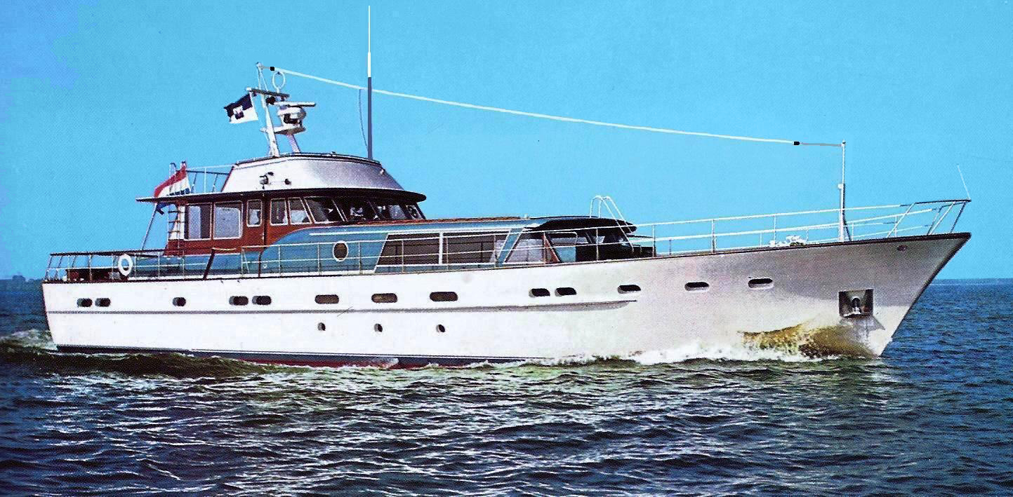 Vedette de plaisance avec antenne VHF et avec antenne MF. L'antenne vertical VHF marine (placée la plus haute et de couleurs blanche) pour le canal 16 et l'antenne oblique (au-dessus sur la longueurs du bateau de couleurs blanche) Template:Unité et Template:Unité sur une vedette de plaisance